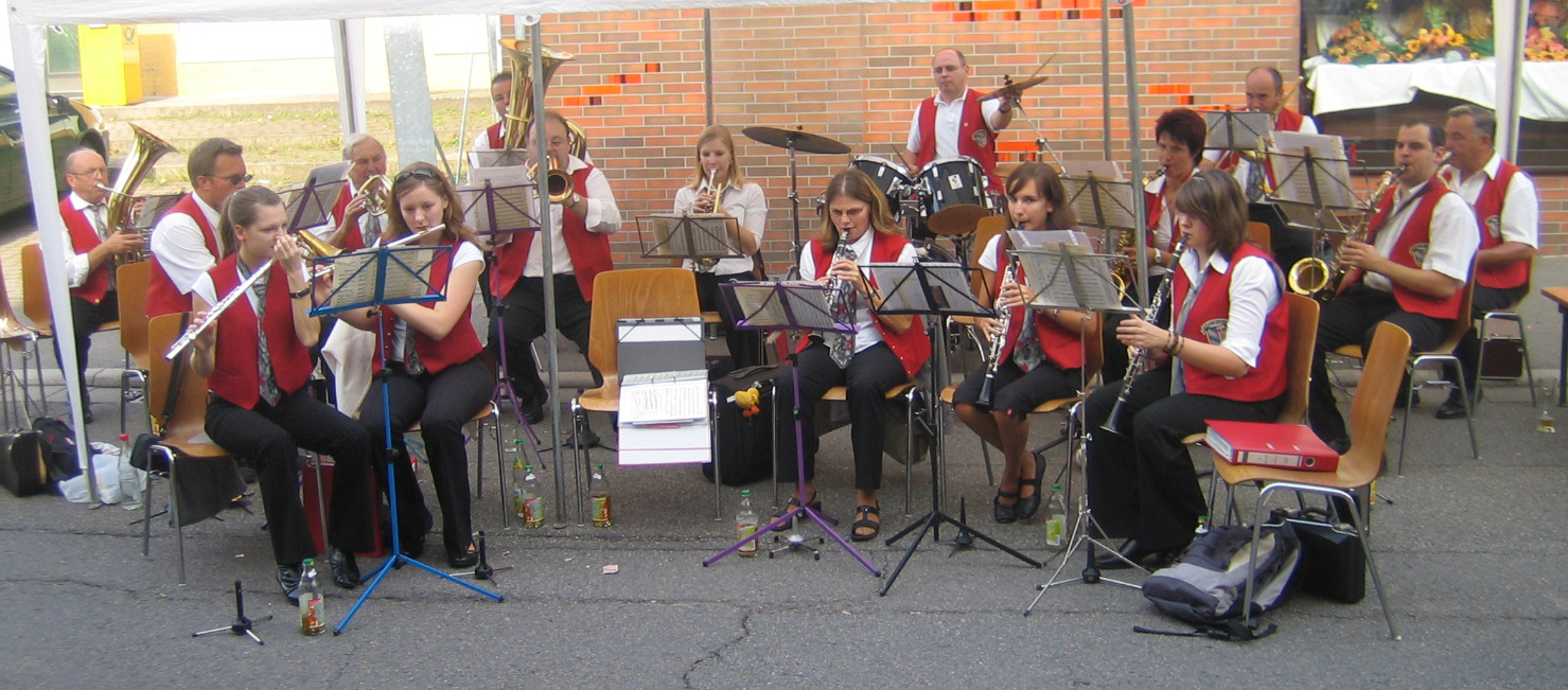 Musikverein in Eschelbronn